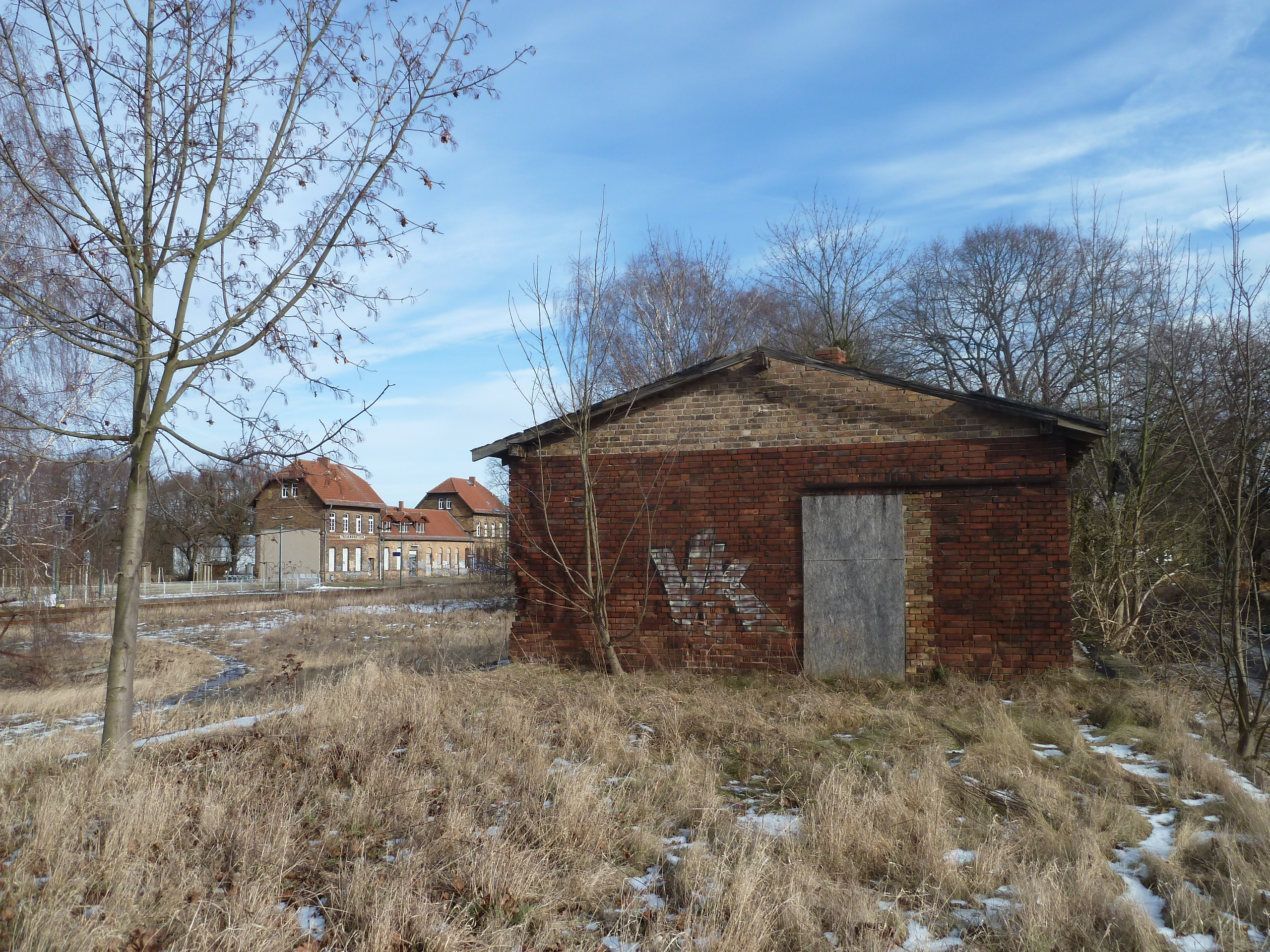 Bahnhof Treuenbrietzen, Güterschuppen der Brandenburgischen Stadtebahn